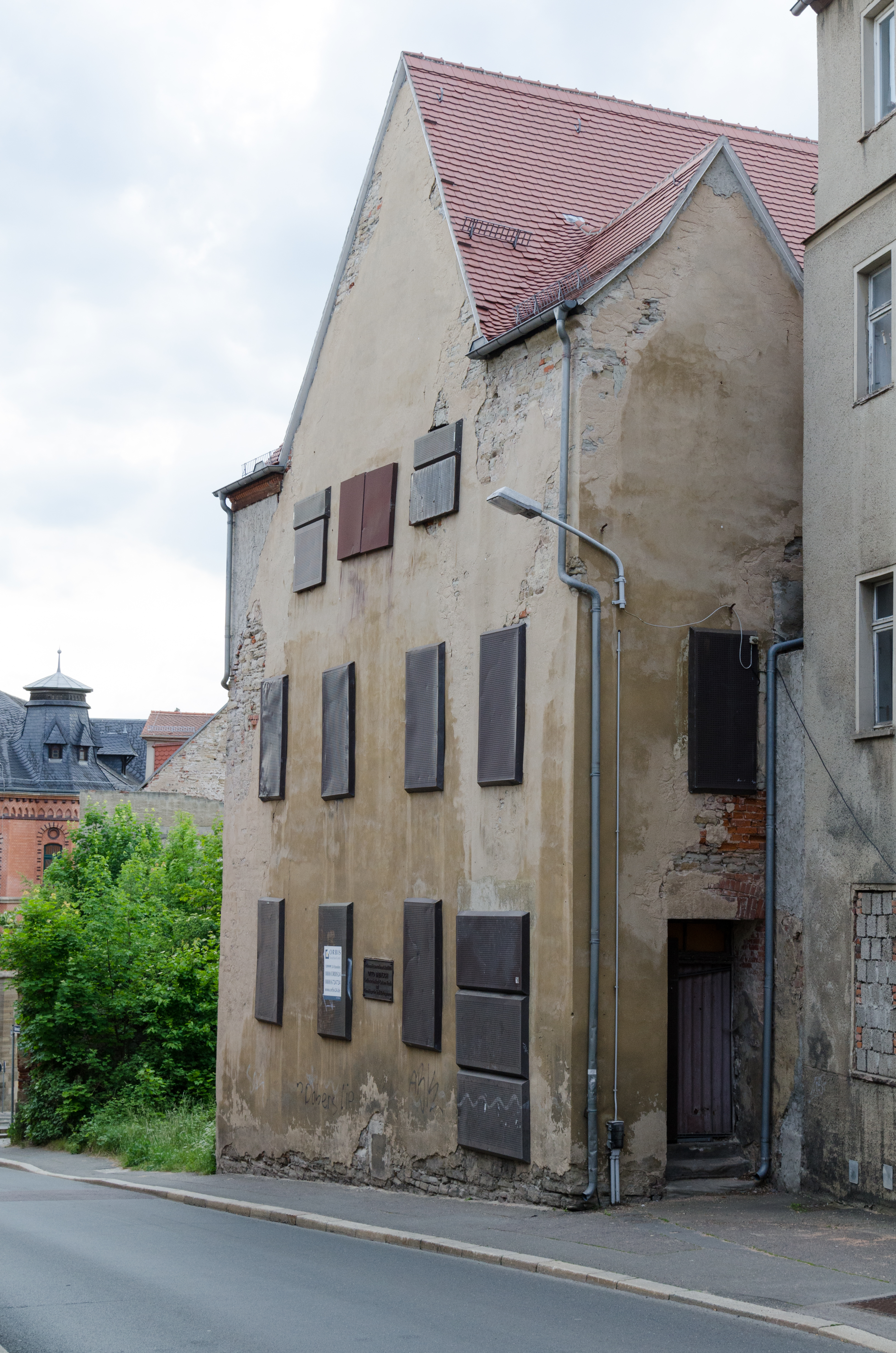 Zeitz, Rahnestraße 16